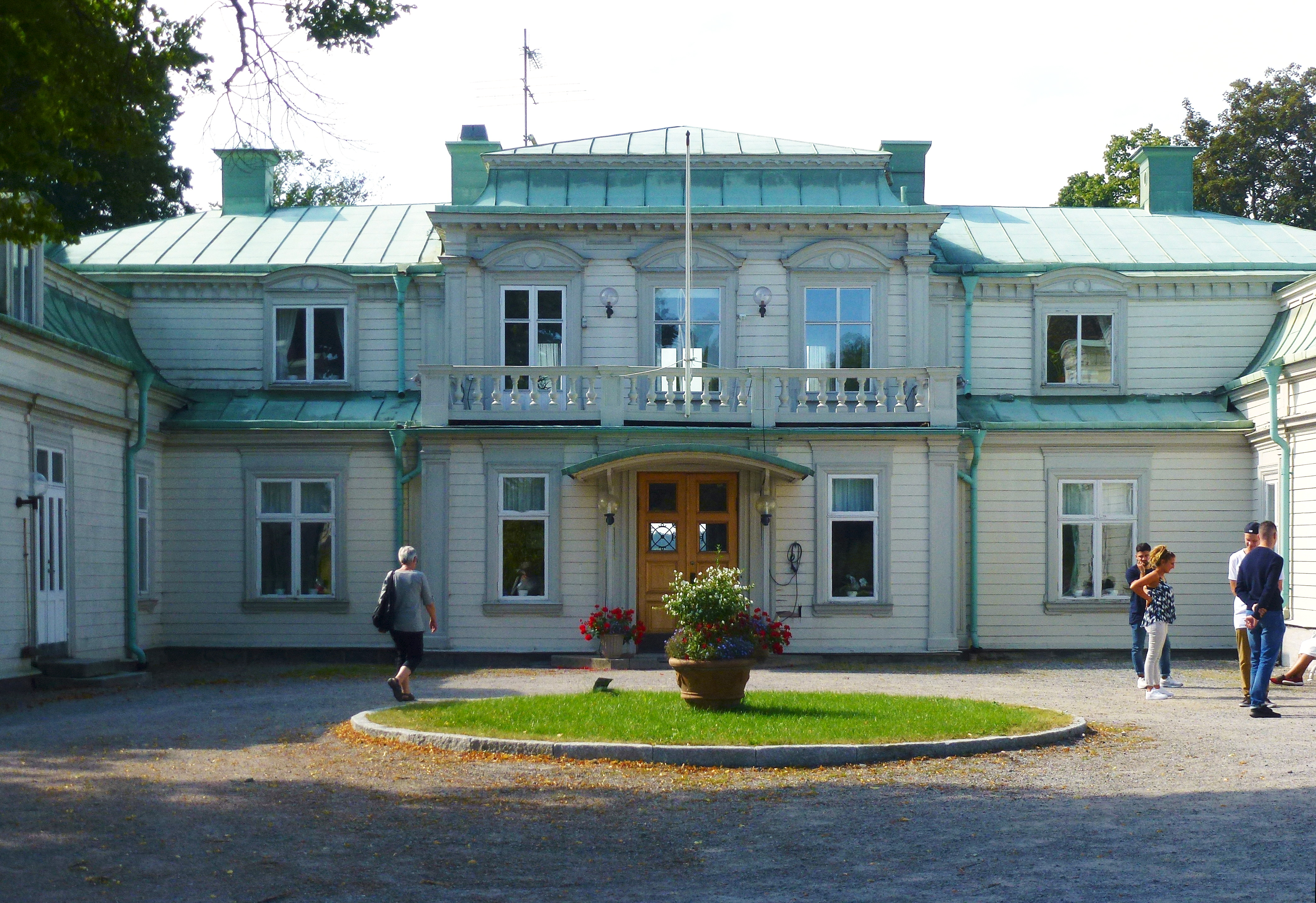 Tollare gård och folkhögskola